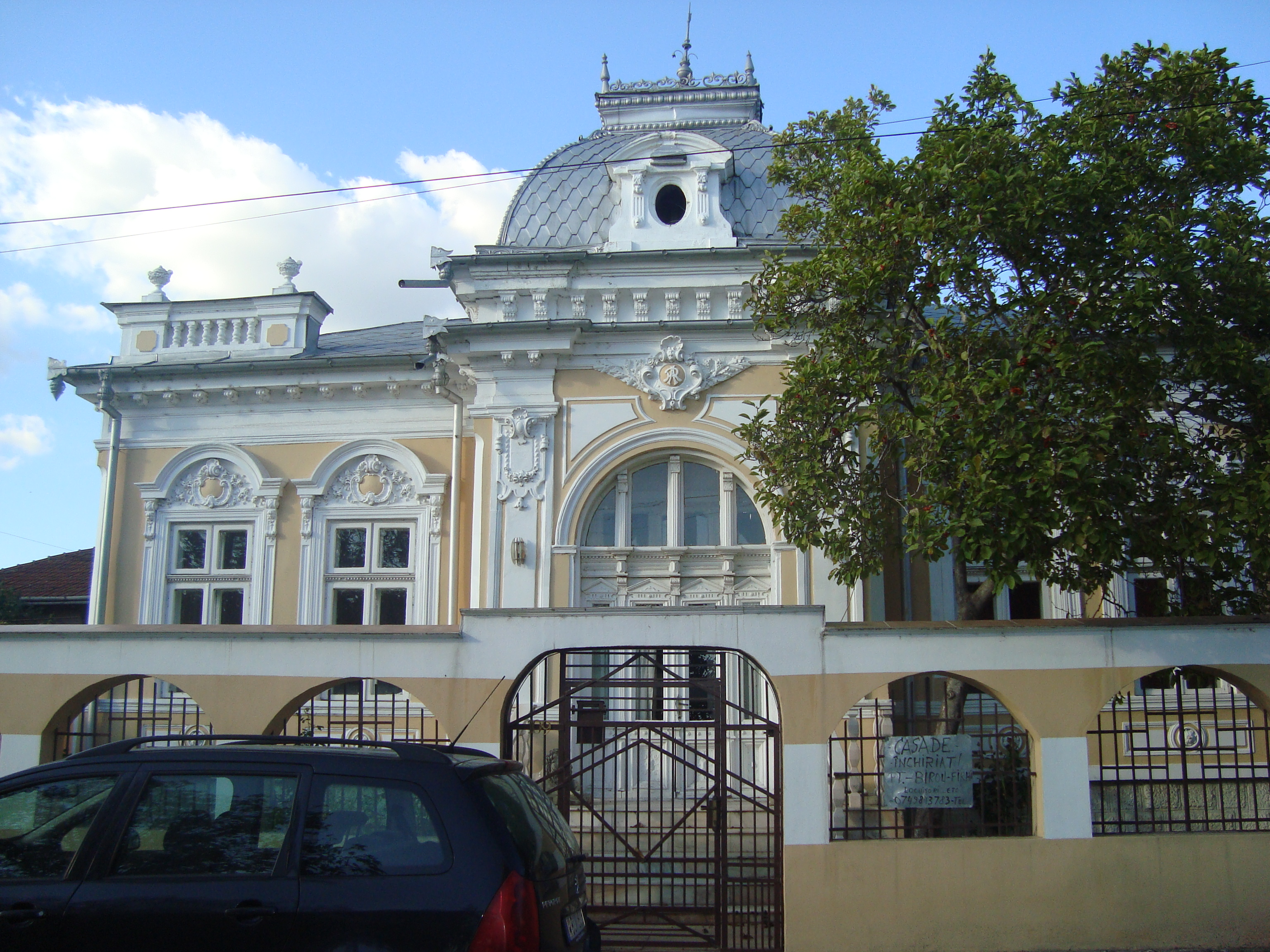 casa istorica